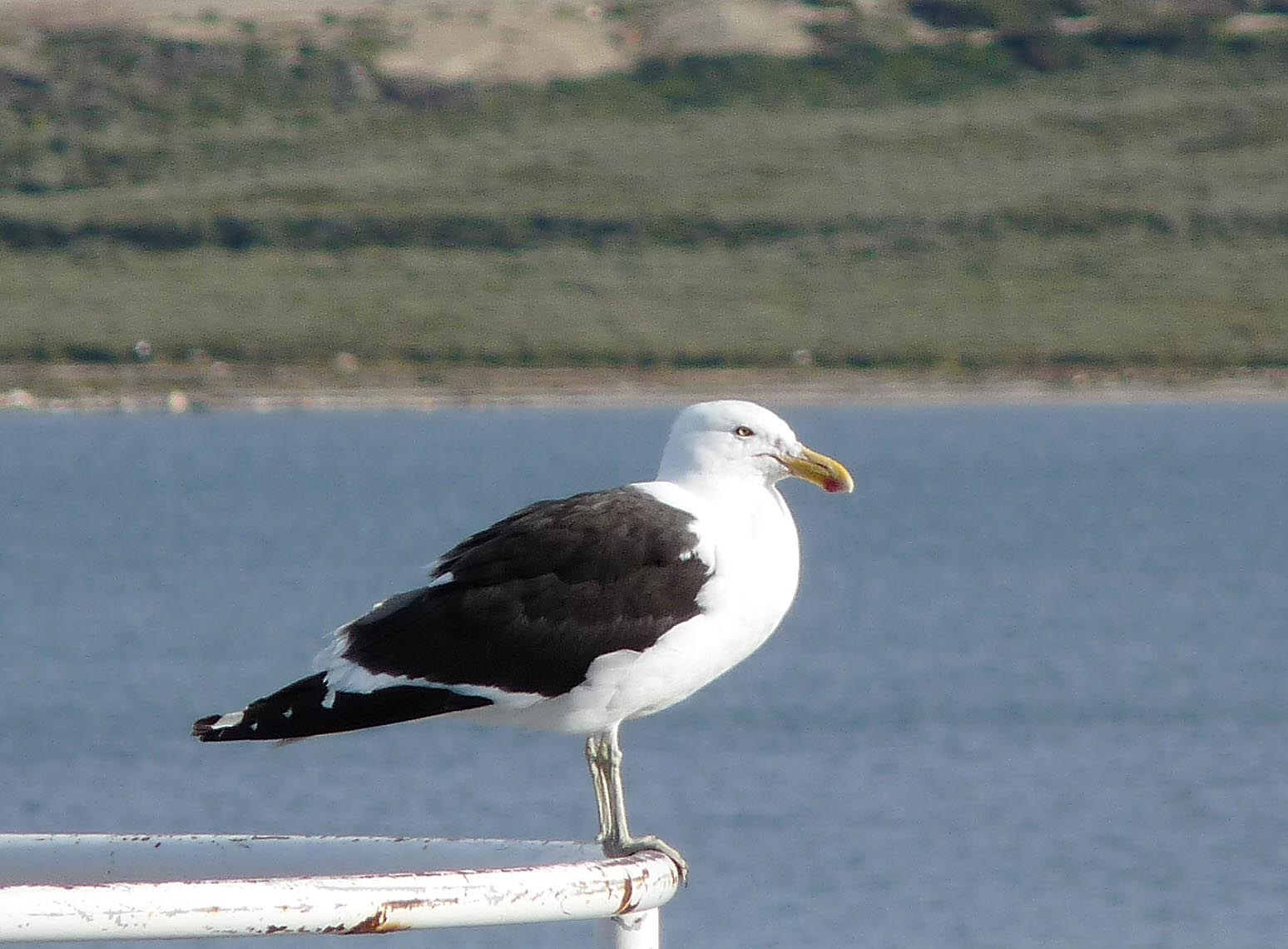 Kelp Gull Larus dominicanus, Ushuaia